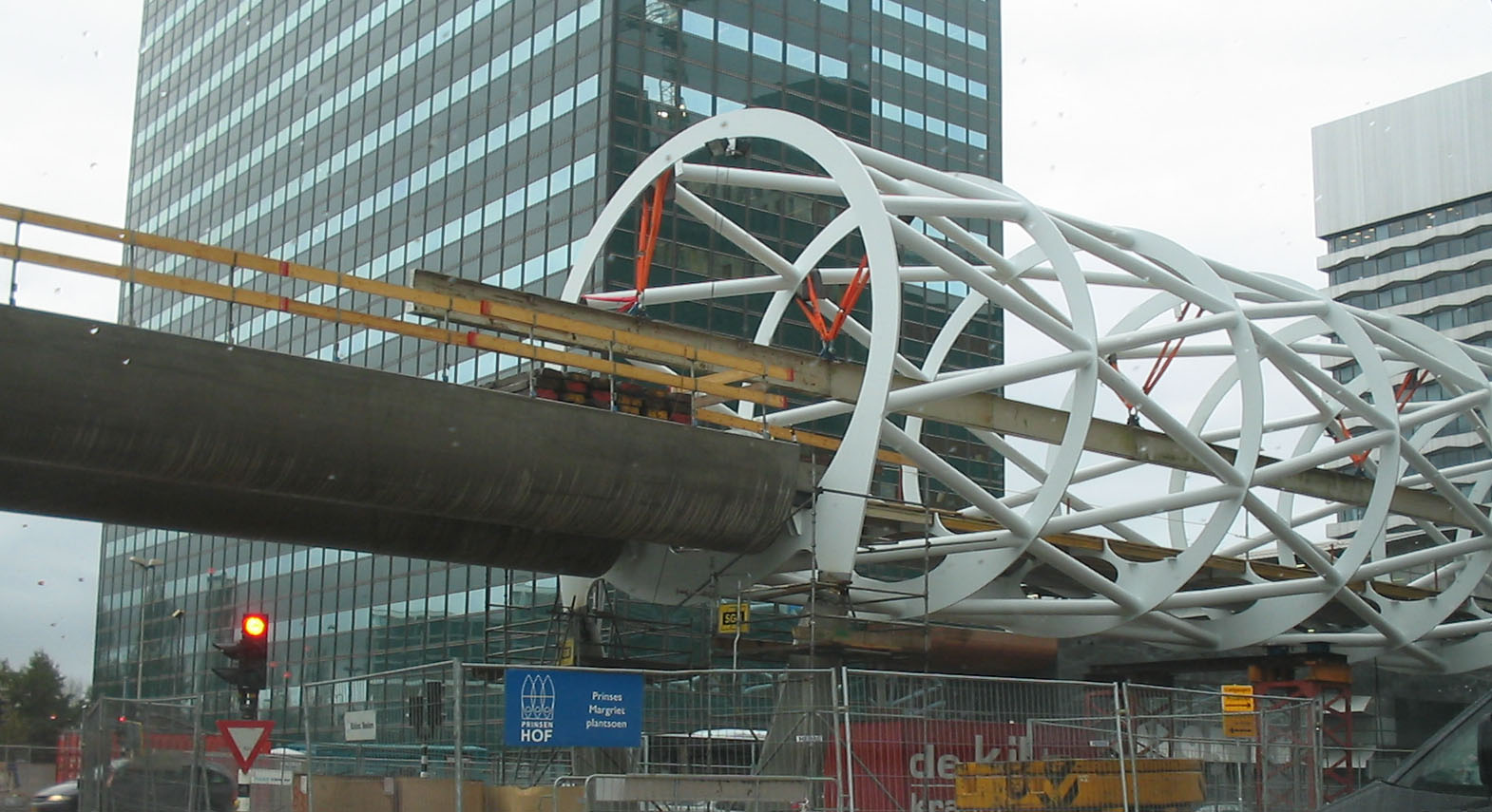 RandstadRail halte in aanbouw, Den Haag, 15 november 2005